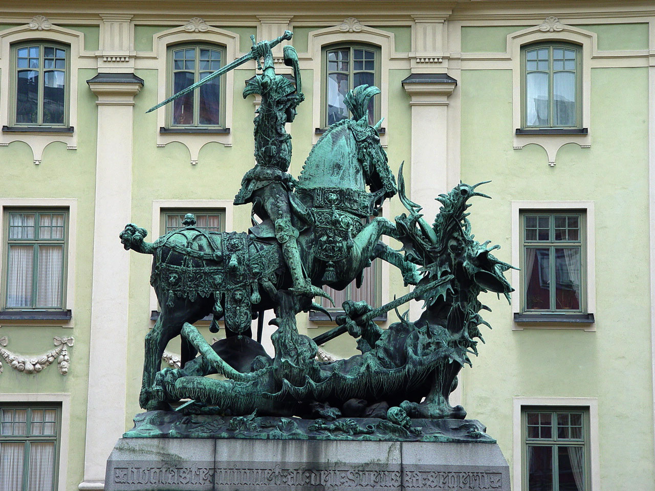 St. Georg und der Drache (Entwurf Bernt Notke) in Stockholm (Gamla Stan)